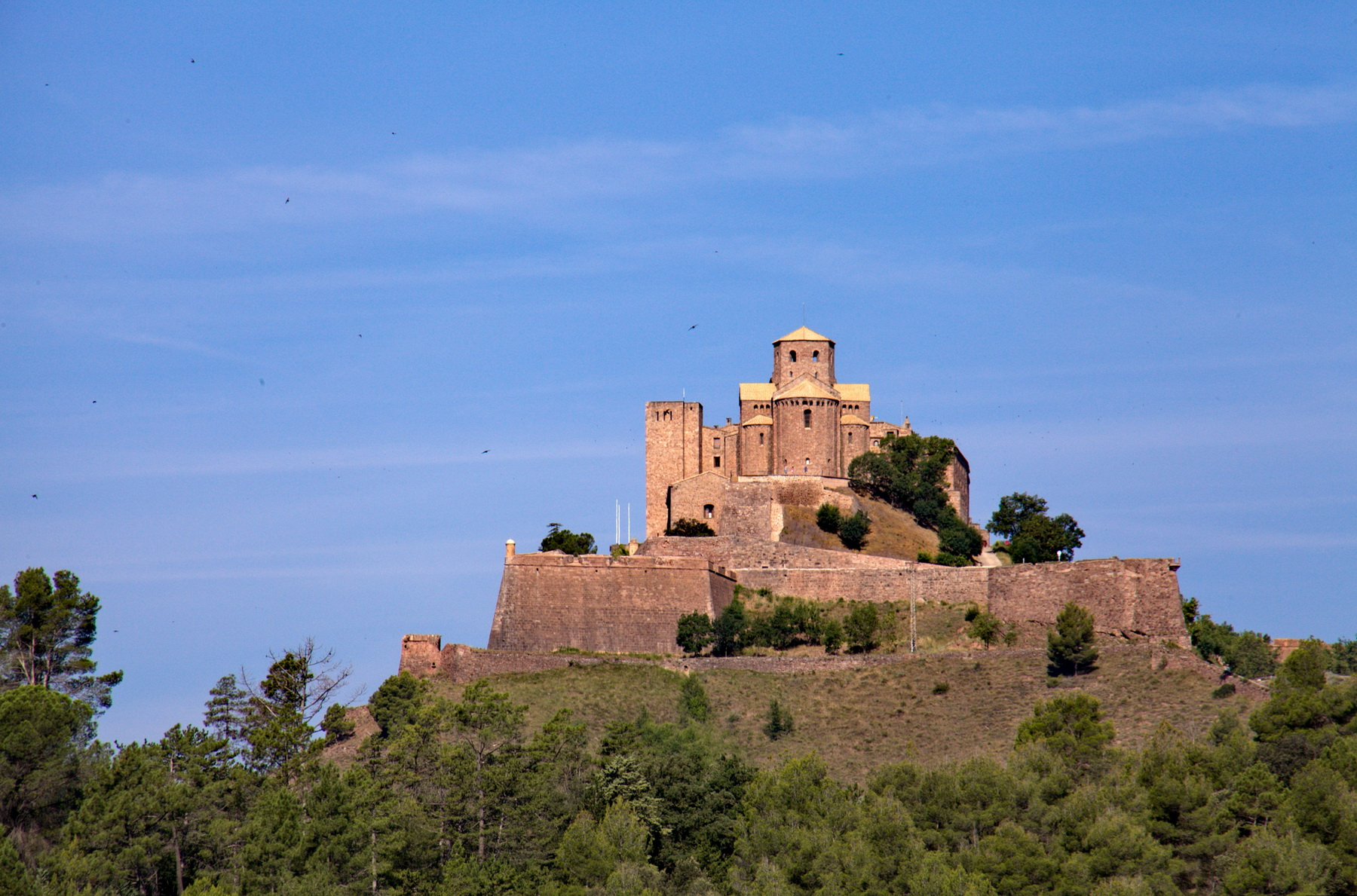 Canònica de Sant Vicenç de Cardona